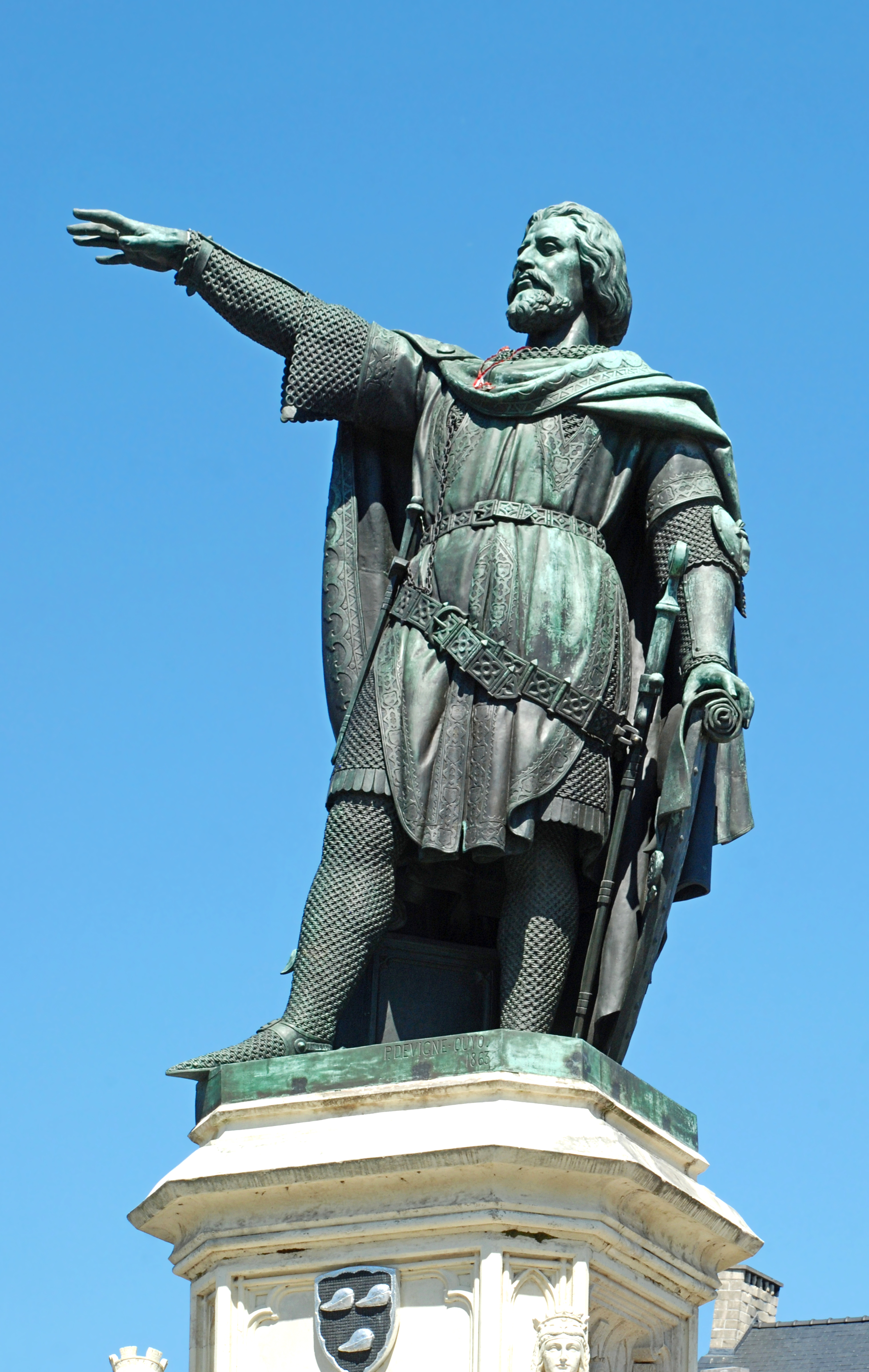 Belgique - Gand - Vrijdagmarkt - Statue de Jacques van Artevelde This photo of immovable heritage has been taken in the Flemish Region